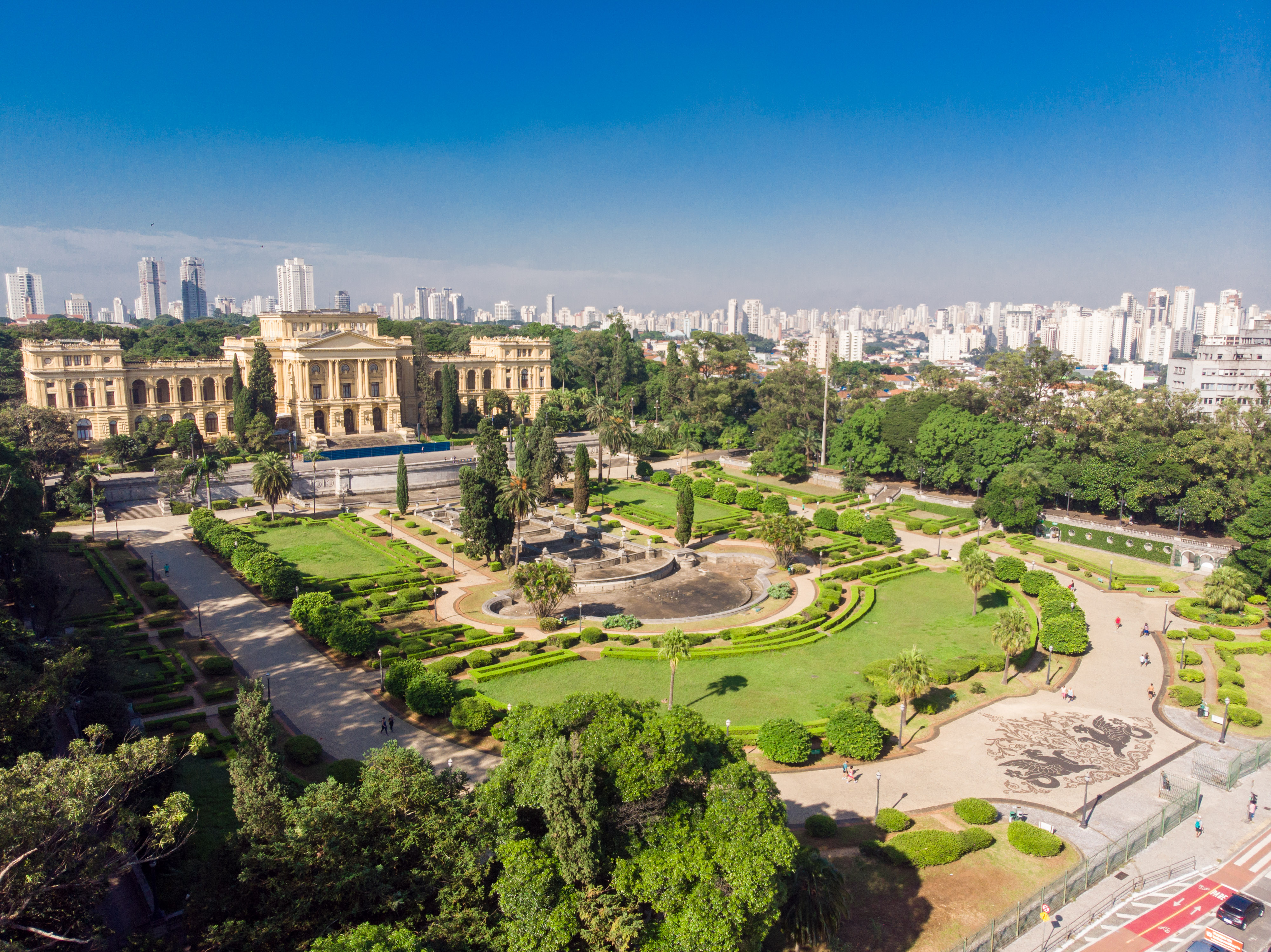 Imagens do Museu do Ipiranga. Local: São Paulo/SP Data: 26/03/2019 Foto: Governo do Estado de São Paulo